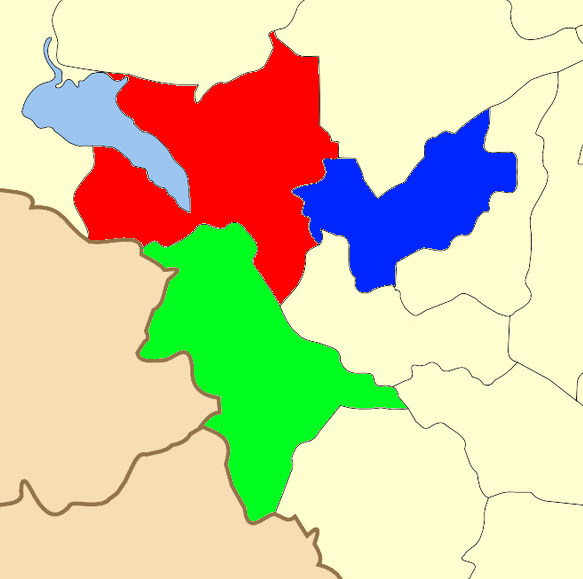 Χάρτης των ενοτήτων (και πρώην δήμων) από τις οποίες αποτελείται ο Δήμος Ηράκλειας